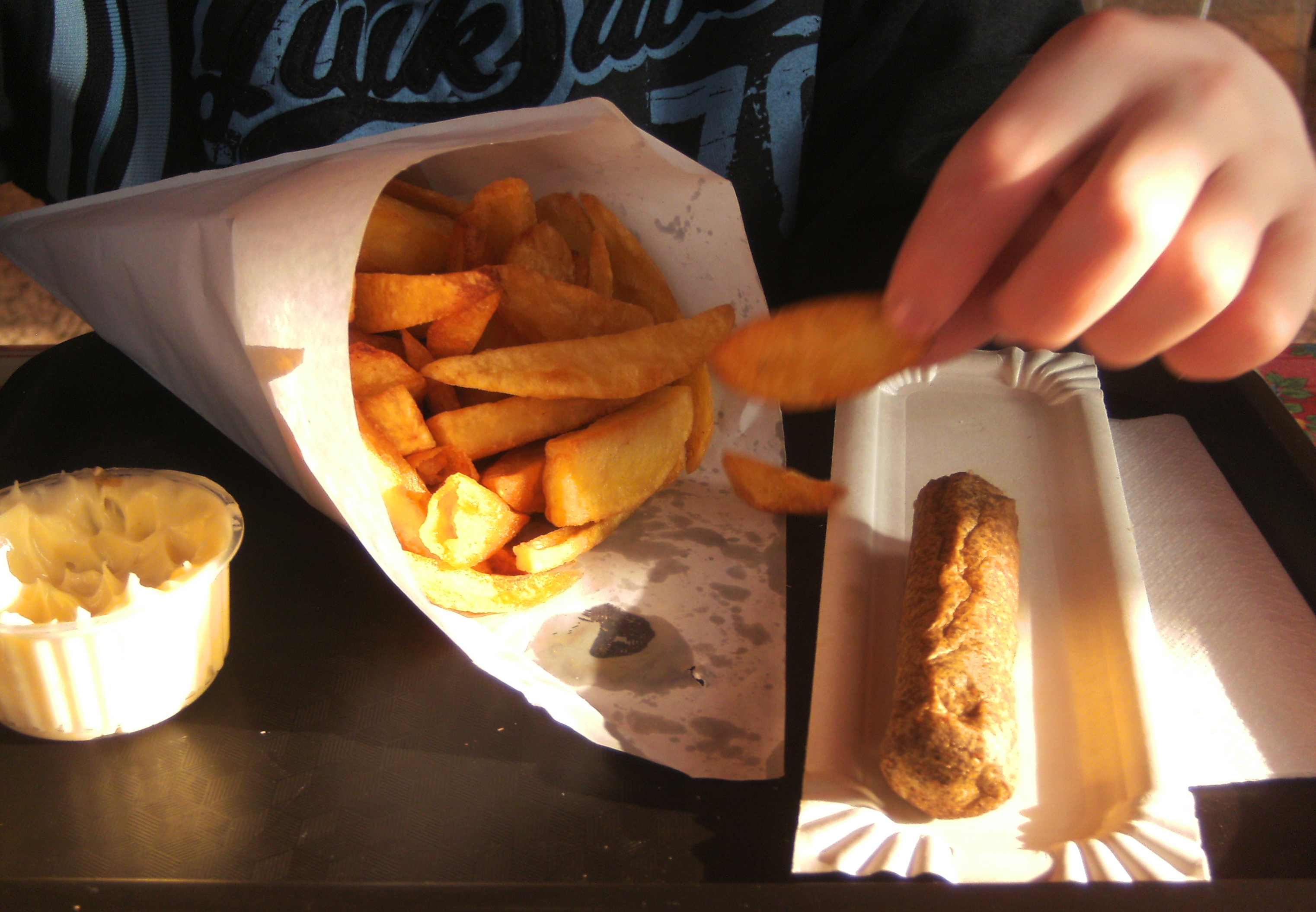 Frites, fricandelle, mayo